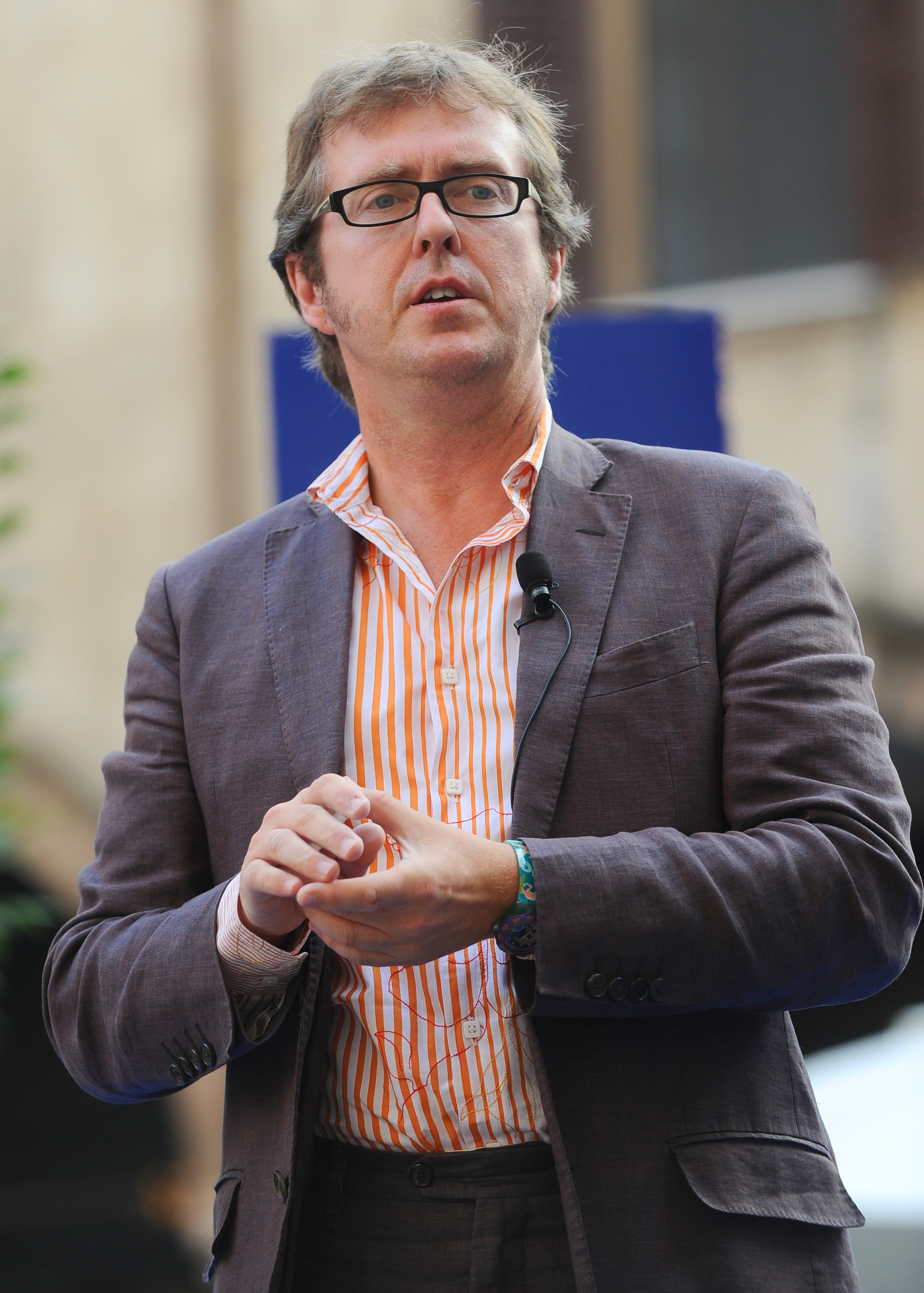 Paul Wilmott a Mantova per il Festivaletteratura 2012.